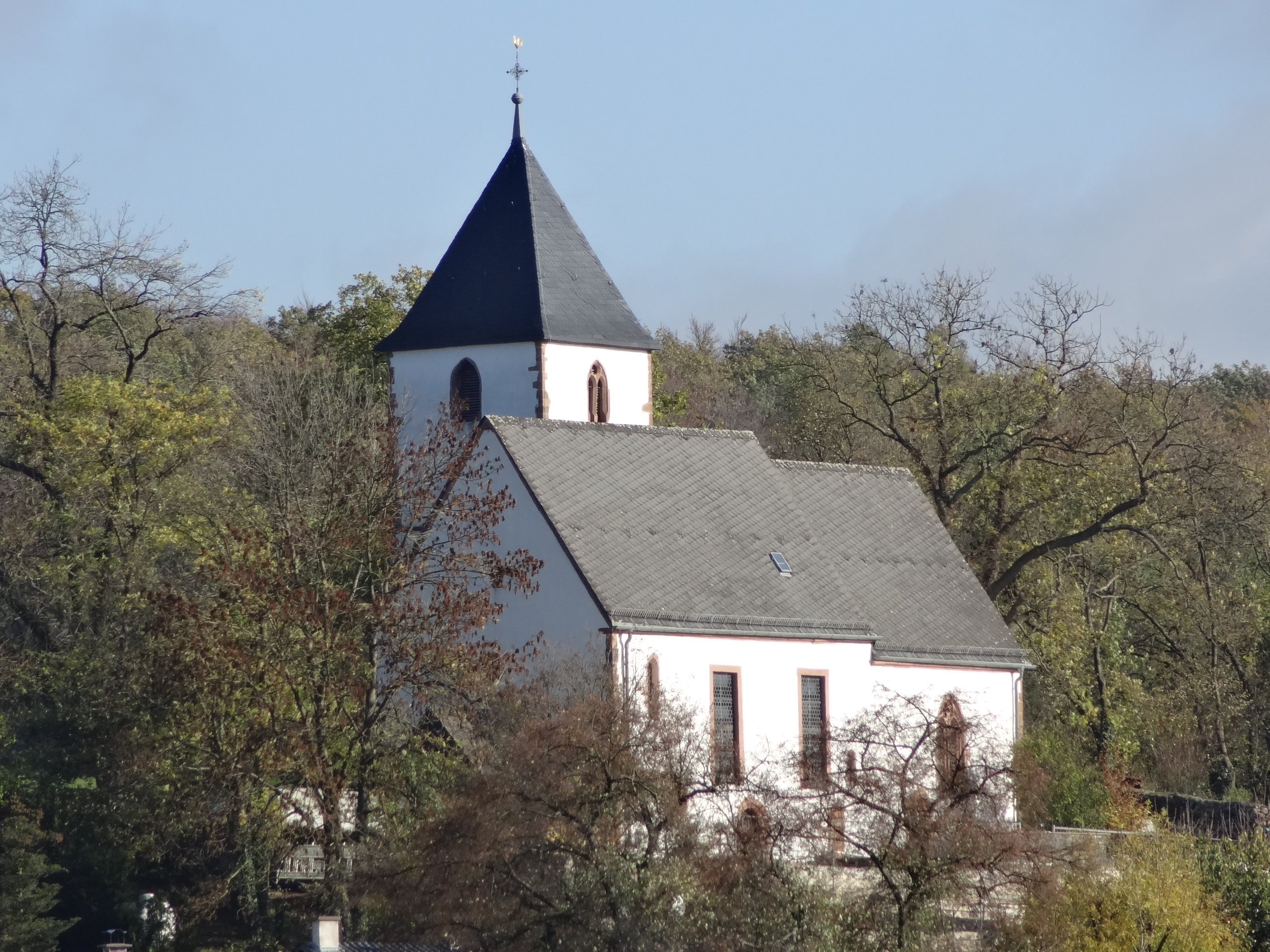 Evangelische Kirche Ober-Widdersheim